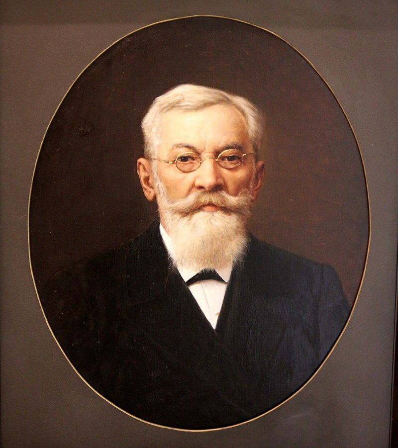 Sergei Lavretsovi portree (1908). Kunstnik Belinski. Narva kunstigalerii